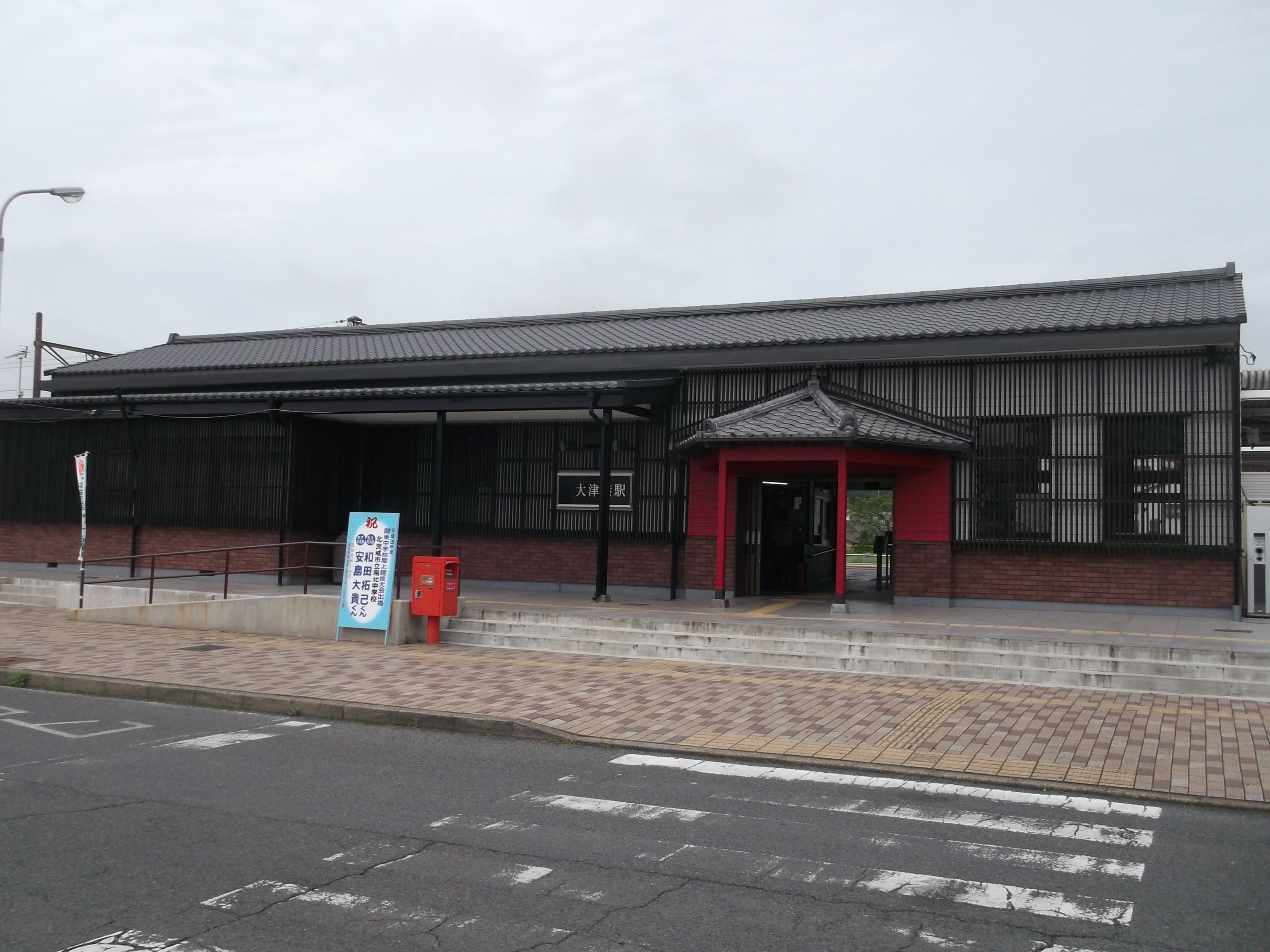 JR常磐線 大津港駅駅舎